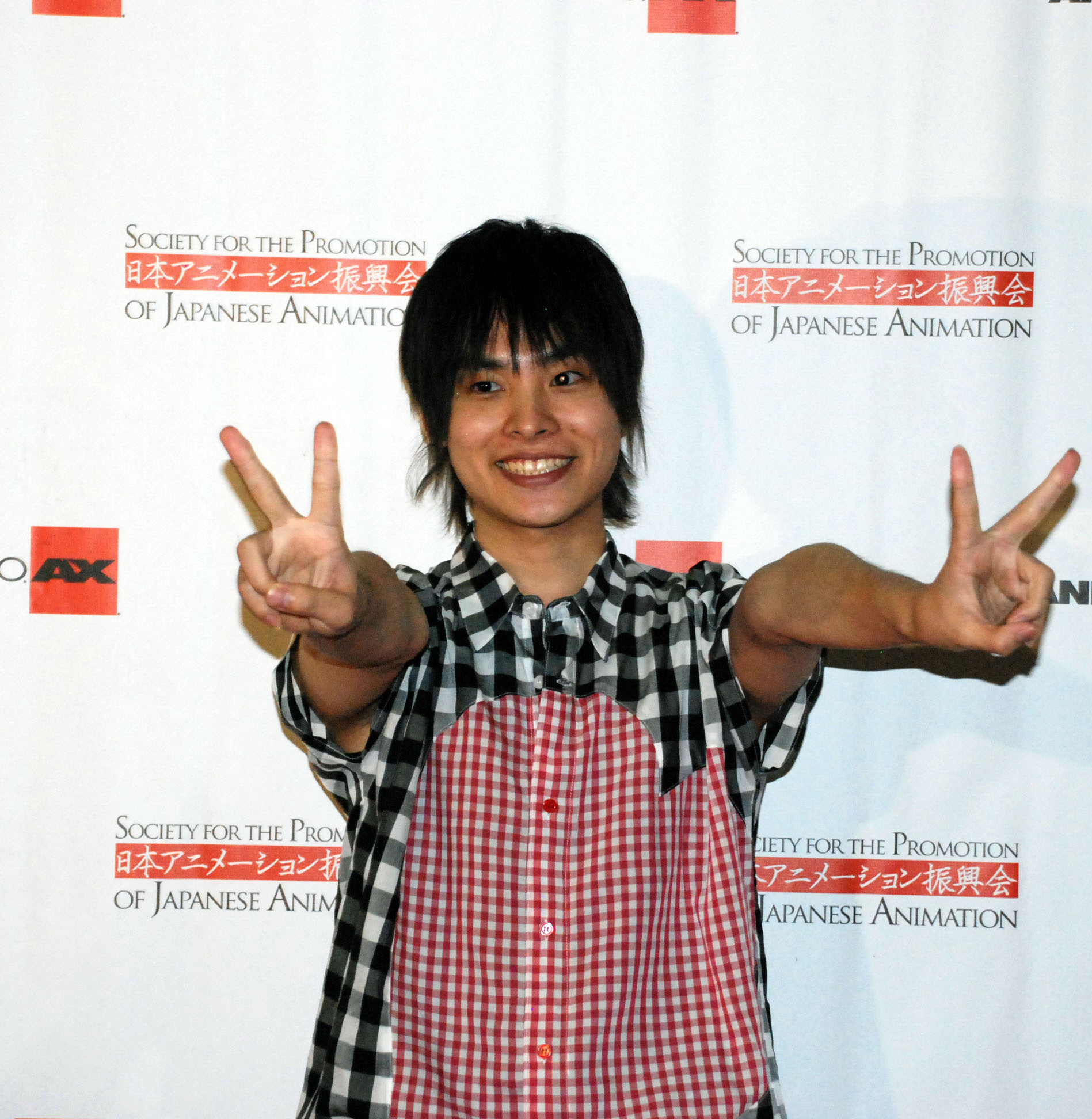 Este niño que por cierto es bien lindo, a hecho las voces de Rin Okumura, el heroe de “Ao no Exorcist,” Eiji Niizuma de“Bakuman,” y más recientemente es Ivan Karelin a.k.a. Origami Cyclone en “Tiger & Bunny”